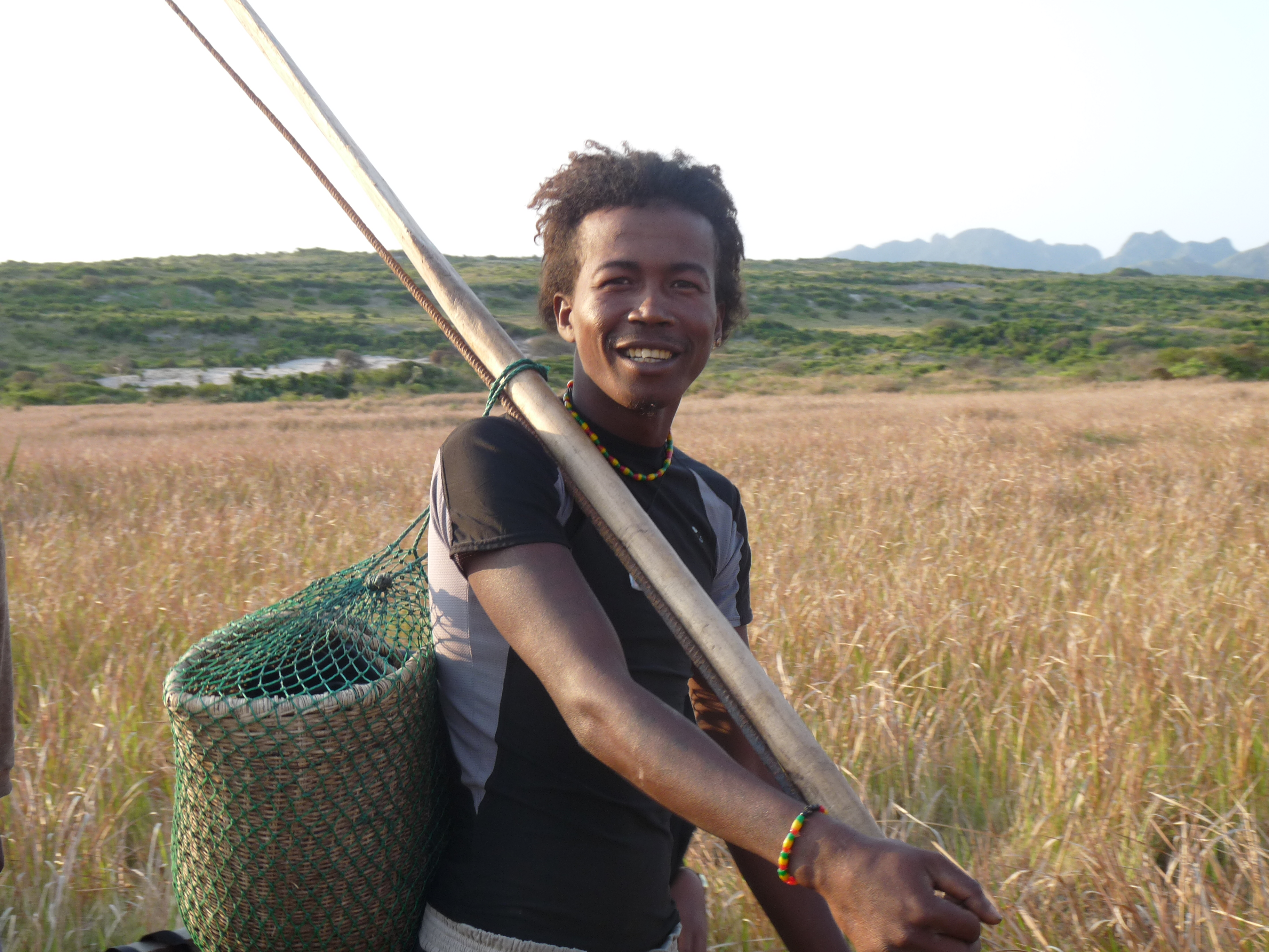 Madagascar,Ford-dauphin,cet homme est un pêcheur de nuit! Une travaille très dangereux,de pêché la nuit avec de pirogue en bois parfois avec des trous.Sur son épaule un truc en bois pour avancé le pirogue et le "vaha" en Malgache pour mettre les poissons This is an image of "African people at work" from Madagascar